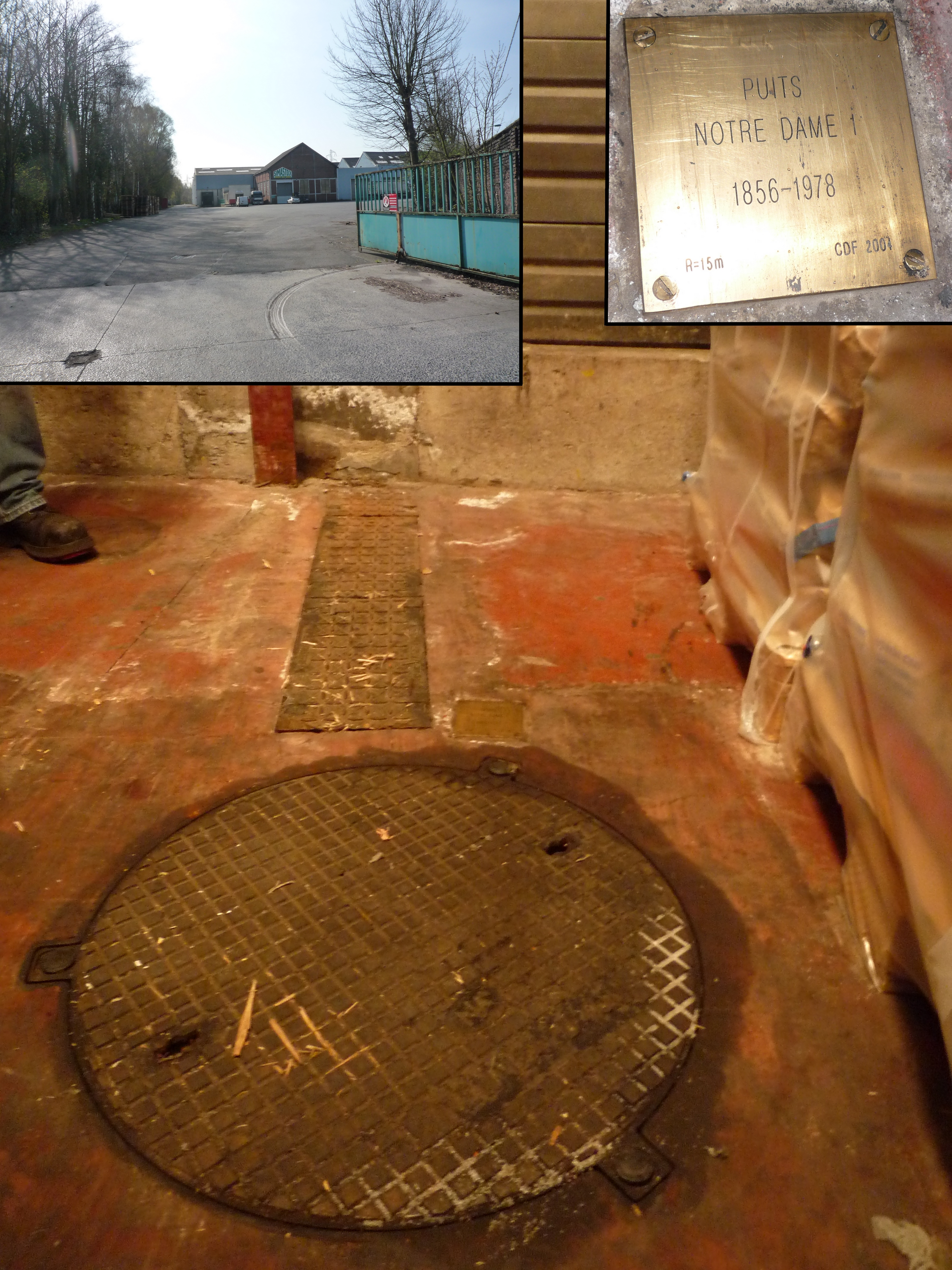 La Fosse Notre-Dame ou Notre Dame de la Compagnie des mines d'Aniche était un charbonnage constitué de deux puits situé à Waziers, Nord, Nord-Pas-de-Calais, France.